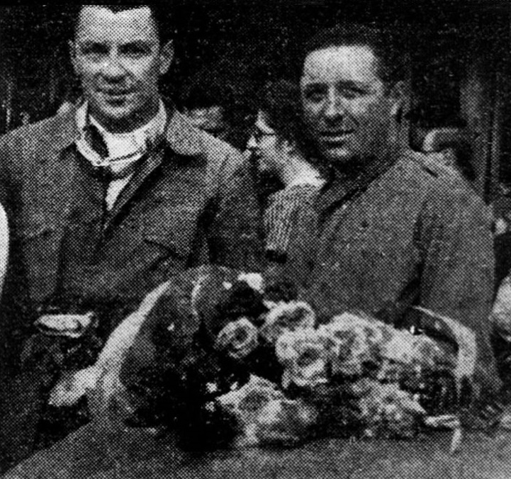 Wimille (G) et Veyrond (D), vainqueurs des 24 Heures du Mans 1939.